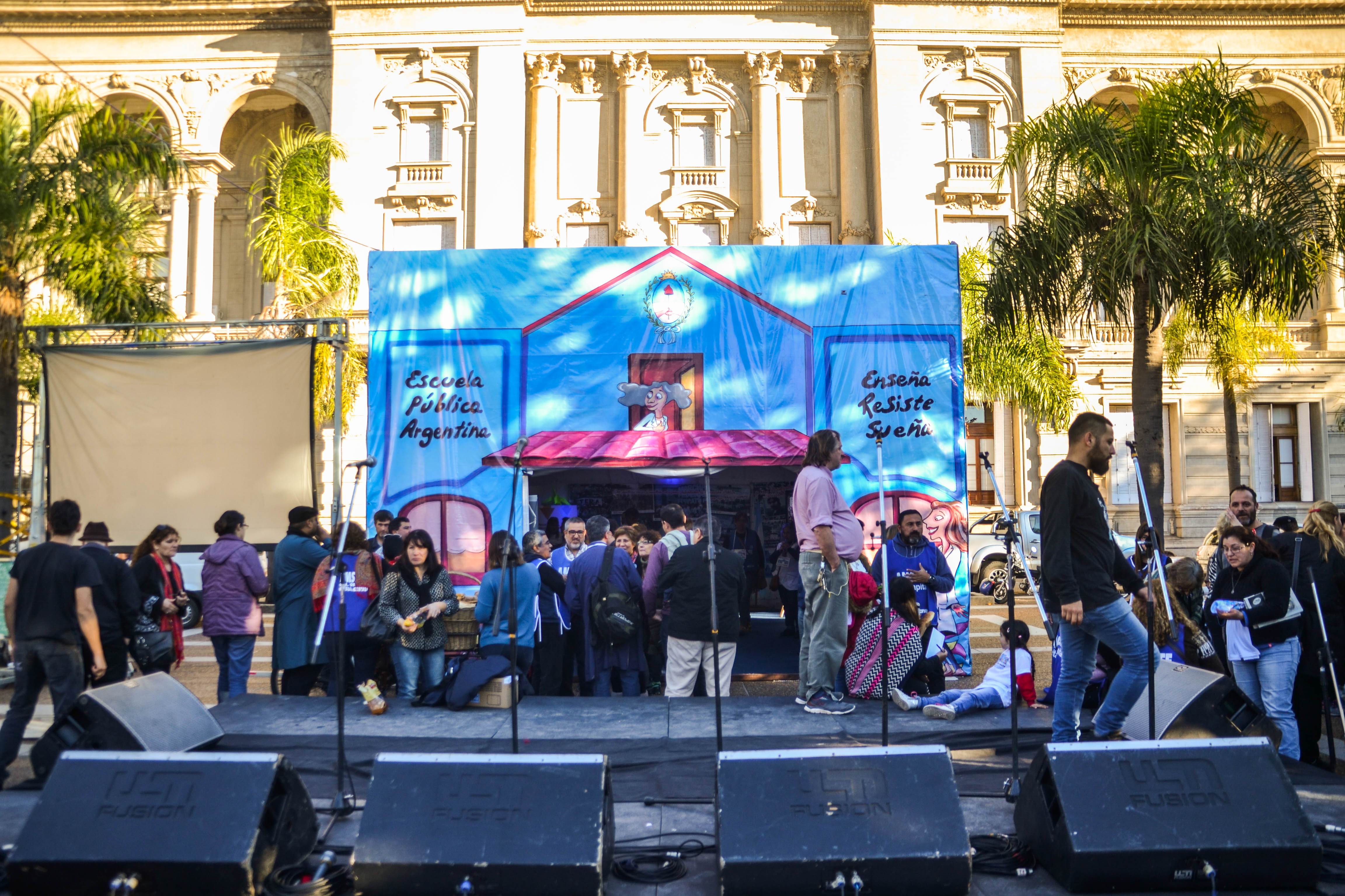 Escuela pública itinerante en la ciudad de Santa Fe